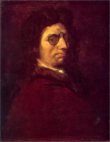 Autoportrait